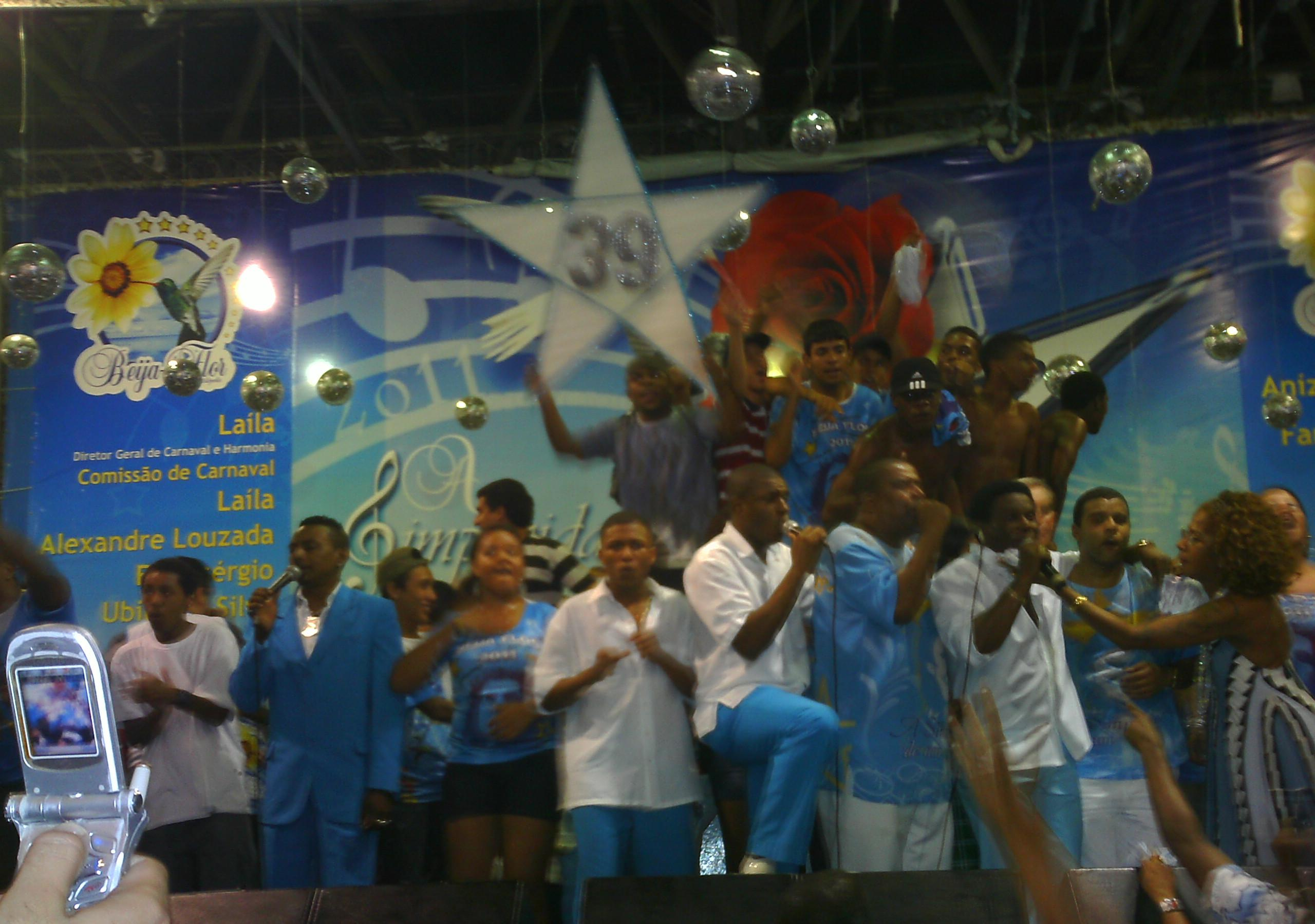 Quadra da Beija-Flor durante a final da escolha de samba enredo para 2011, no dia 14-10-2010. Foto tirada após o anúncio do samba vencedor, de número 39, da parceria de Samir Trindade, Serginho Aguiar, JR Beija Flor, Sidney de Pilares, Jorginho Moreira e Théo M. Neto.